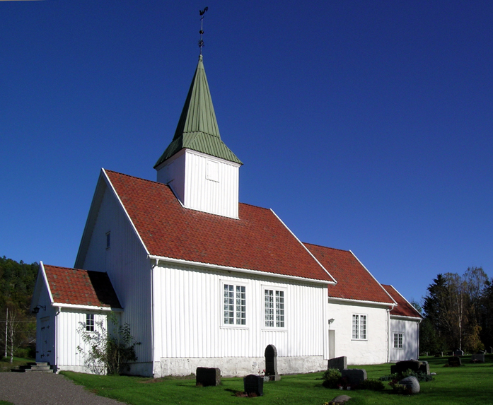 Kodal church, Andebu, Norway.